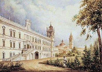 Il Palazzo Ducale di Colorno visto dal giardino